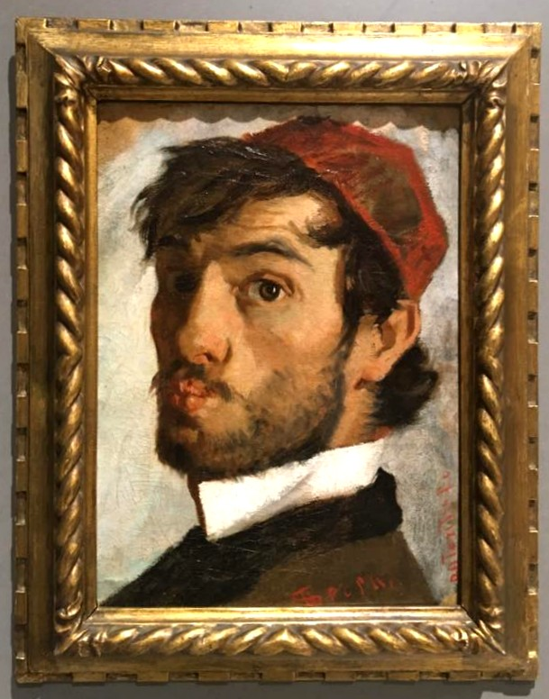 Autoritratto di Luigi Serena conservato al Museo Bailo di Treviso